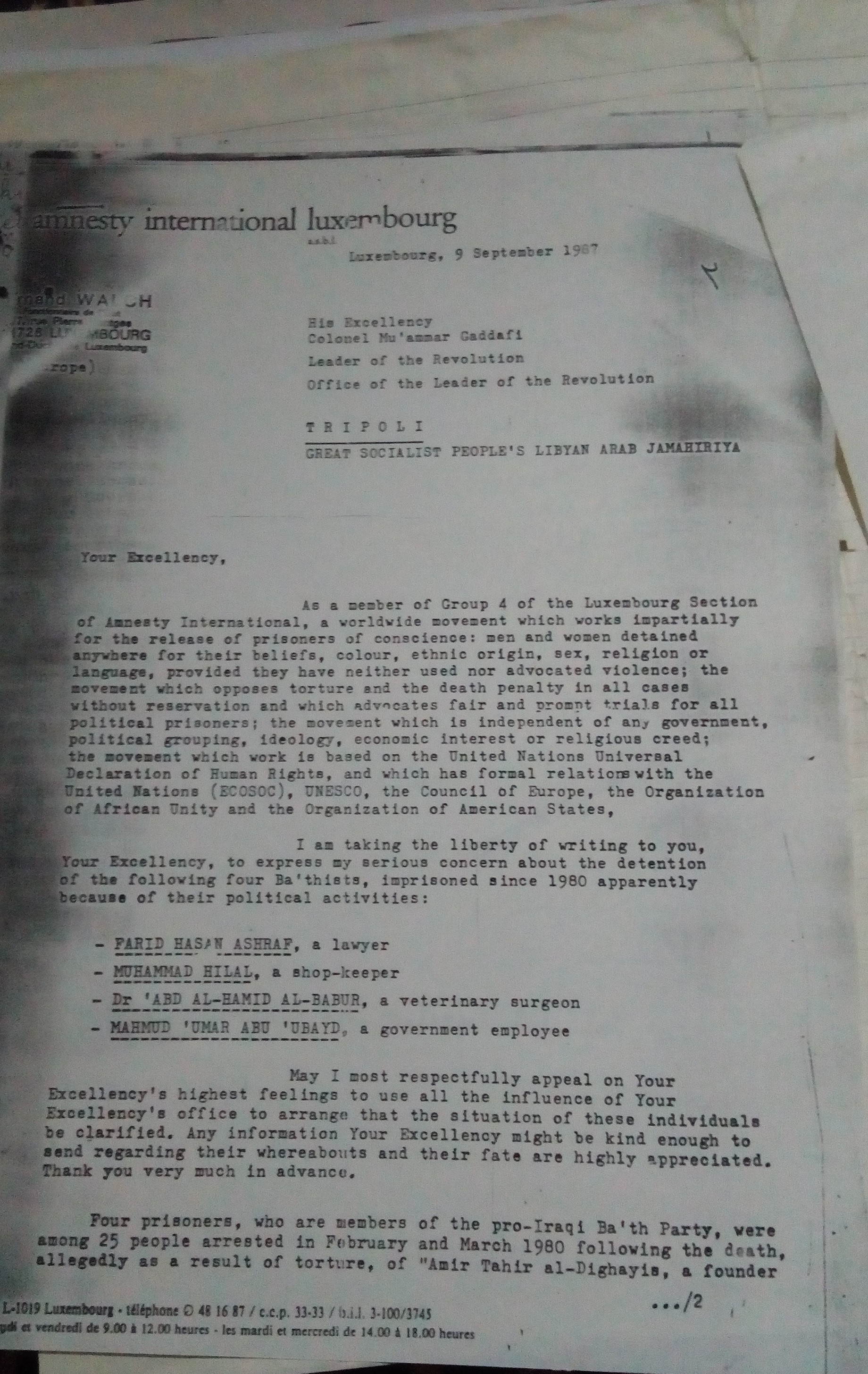 اعتبرهم الحزب الشيوعي في لوكمبورغ معتقلي رأي و طالب القذافي بالإفراج عنهم